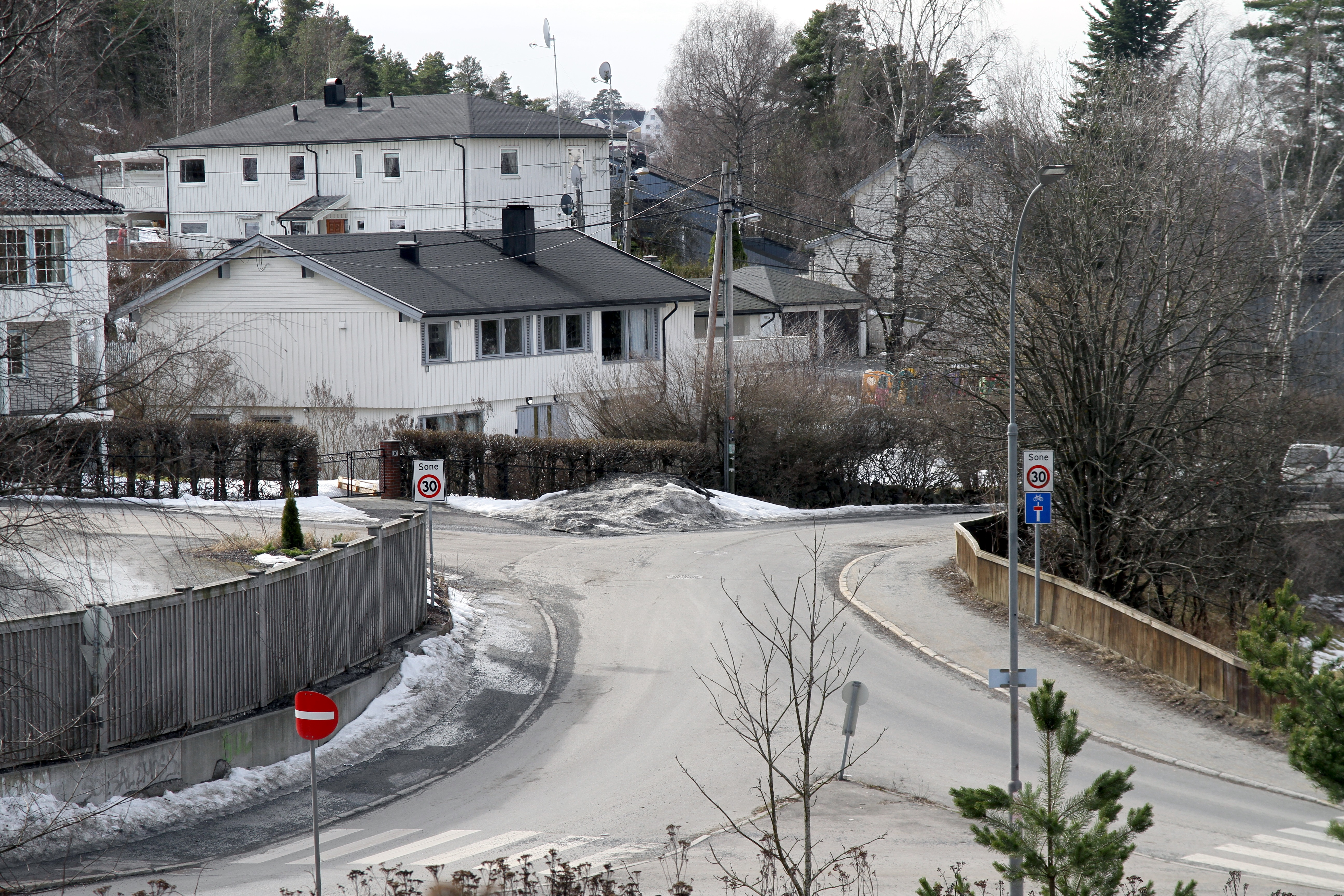 Fyrstikkbakken sett fra Tvetenveien.